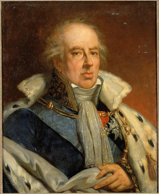 Commandé par Louis-Philippe pour le musée historique de Versailles en 1836